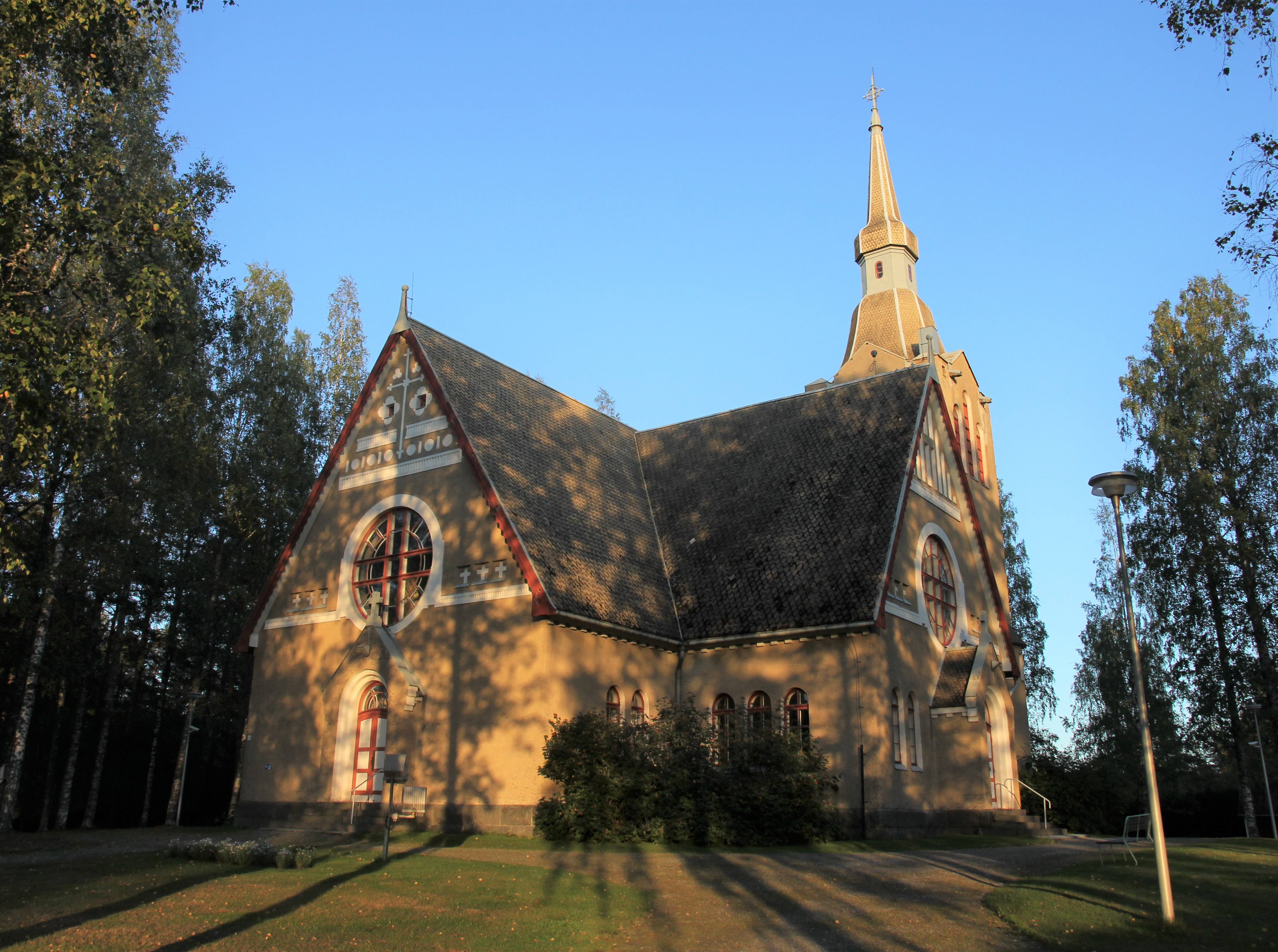 Vehmersalmen kirkko, Lempeläntie 17, Vehmersalmi, Kuopio. Kirkkorakennus on Josef Stenbäckin suunnittelema rapattu tiilikirkko, joka valmistui vuonna 1919. Muodoltaan se on tornillinen pitkäkirkko, jossa on korkea satulakatto. Kirkossa on 600 istumapaikkaa. Kotisivu: Lisätietoa myös rakennuspiirroksia